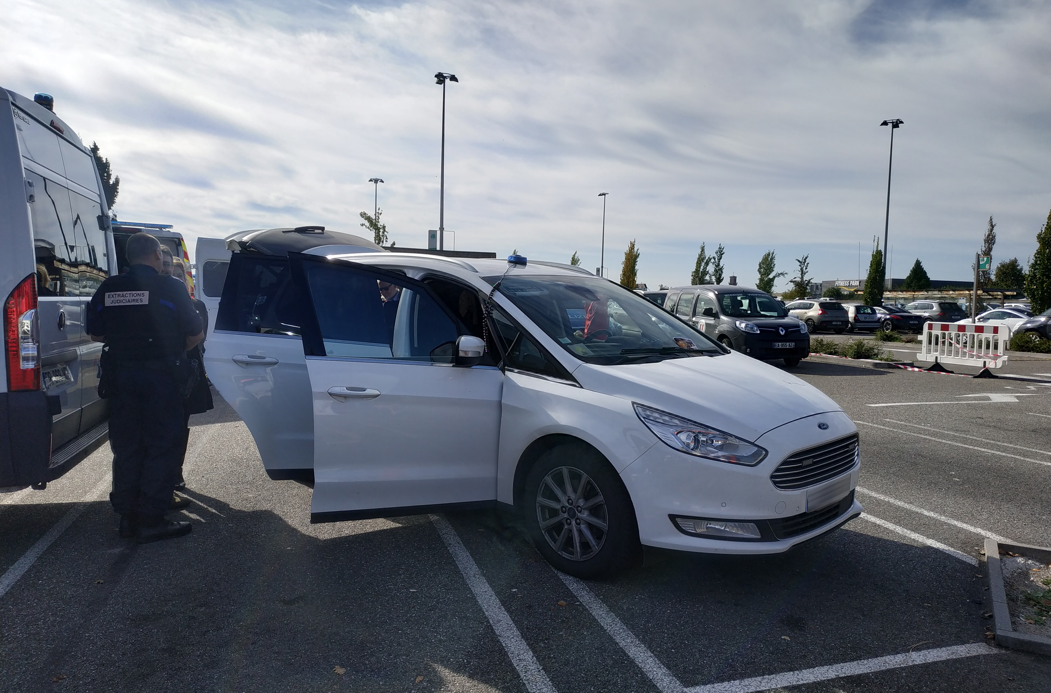 Véhicule servant aux extractions judiciaires pour le Ministère de la justice, Photo prise à Mundolsheim dans le cadre des rencontres de la sécurité intérieure de 2019